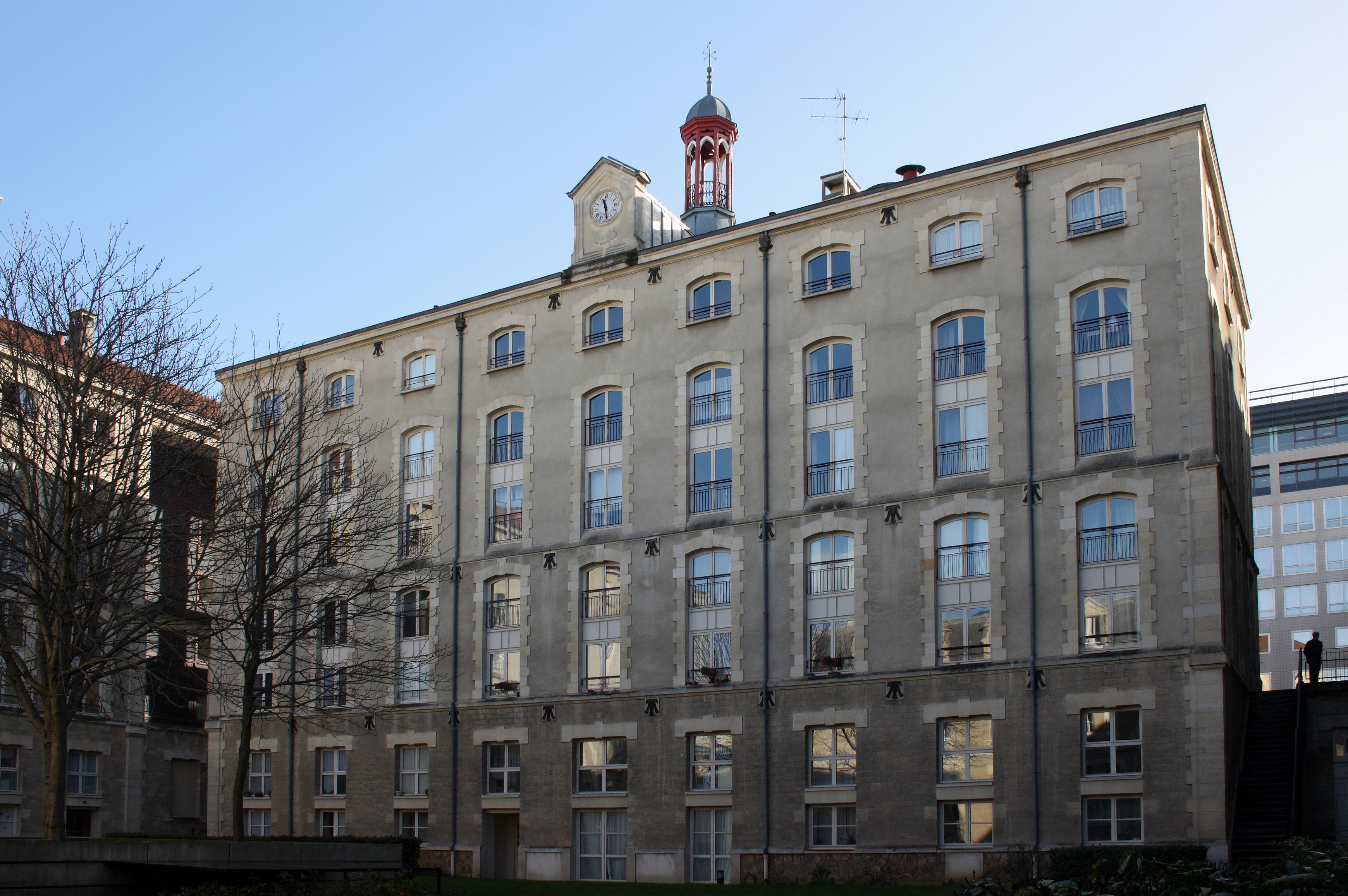 Ehemalige Tabakmanufaktur in Issy-les-Moulineaux im Département Hauts-de-Seine (Région Île-de-France), Rue Ernest Renan N° 17